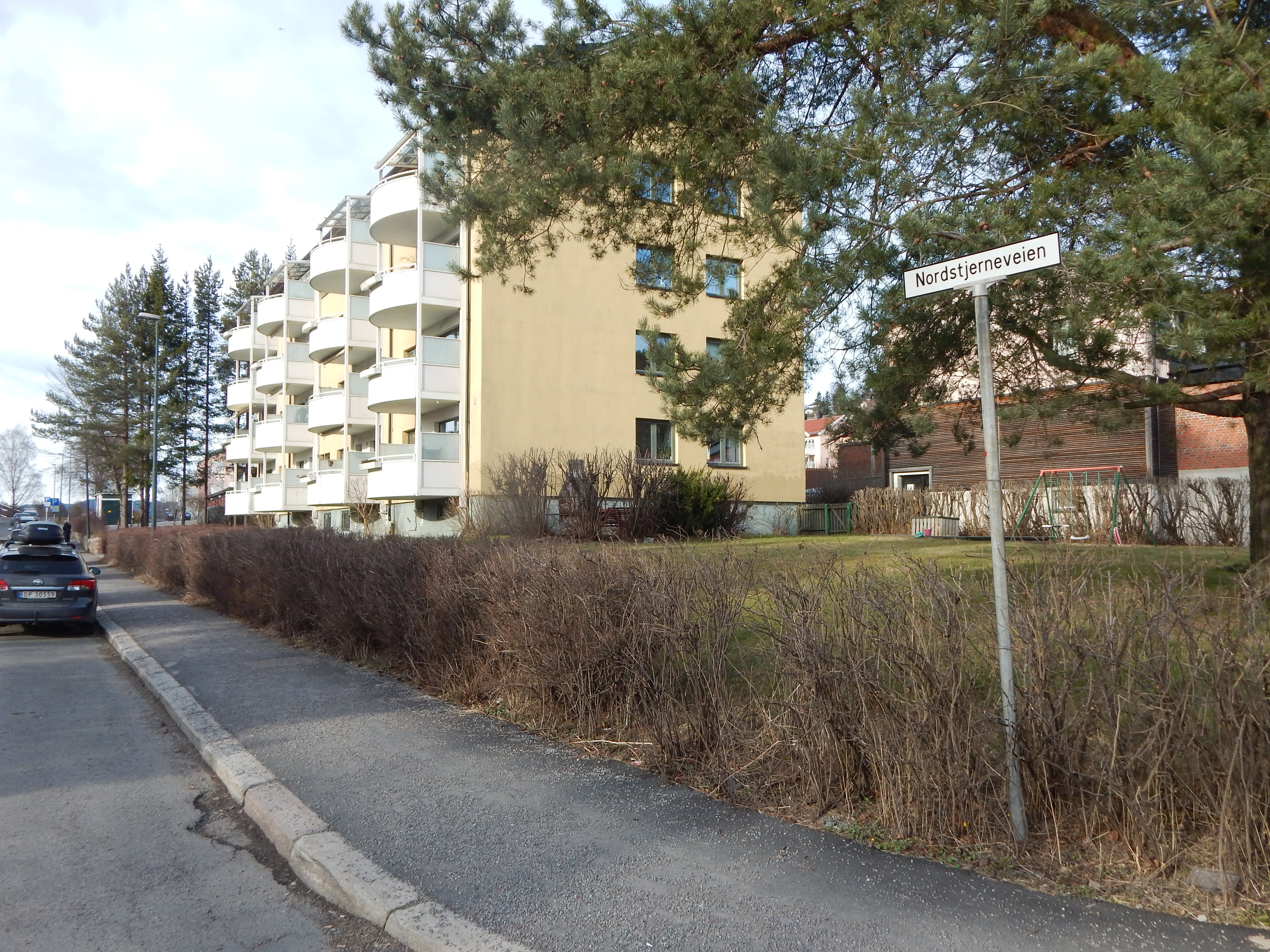 Nordstjerneveien sett fra Myrerskogveien